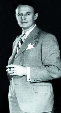 фото-портрет Адальберта Ерделі